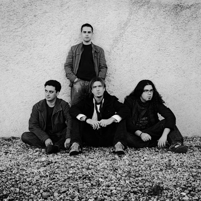 Shine